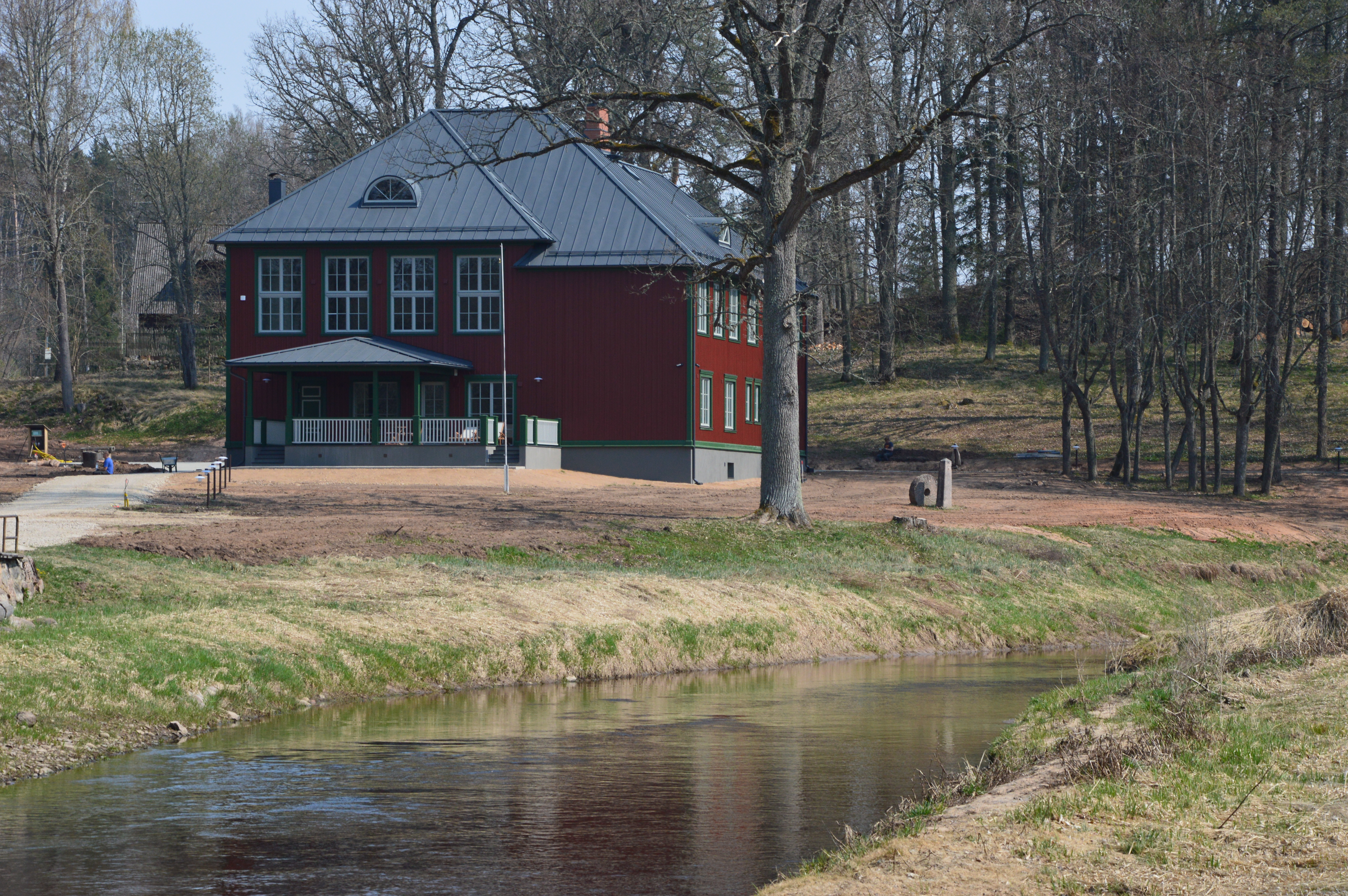 Endine Vastse-Roosa koolimaja.